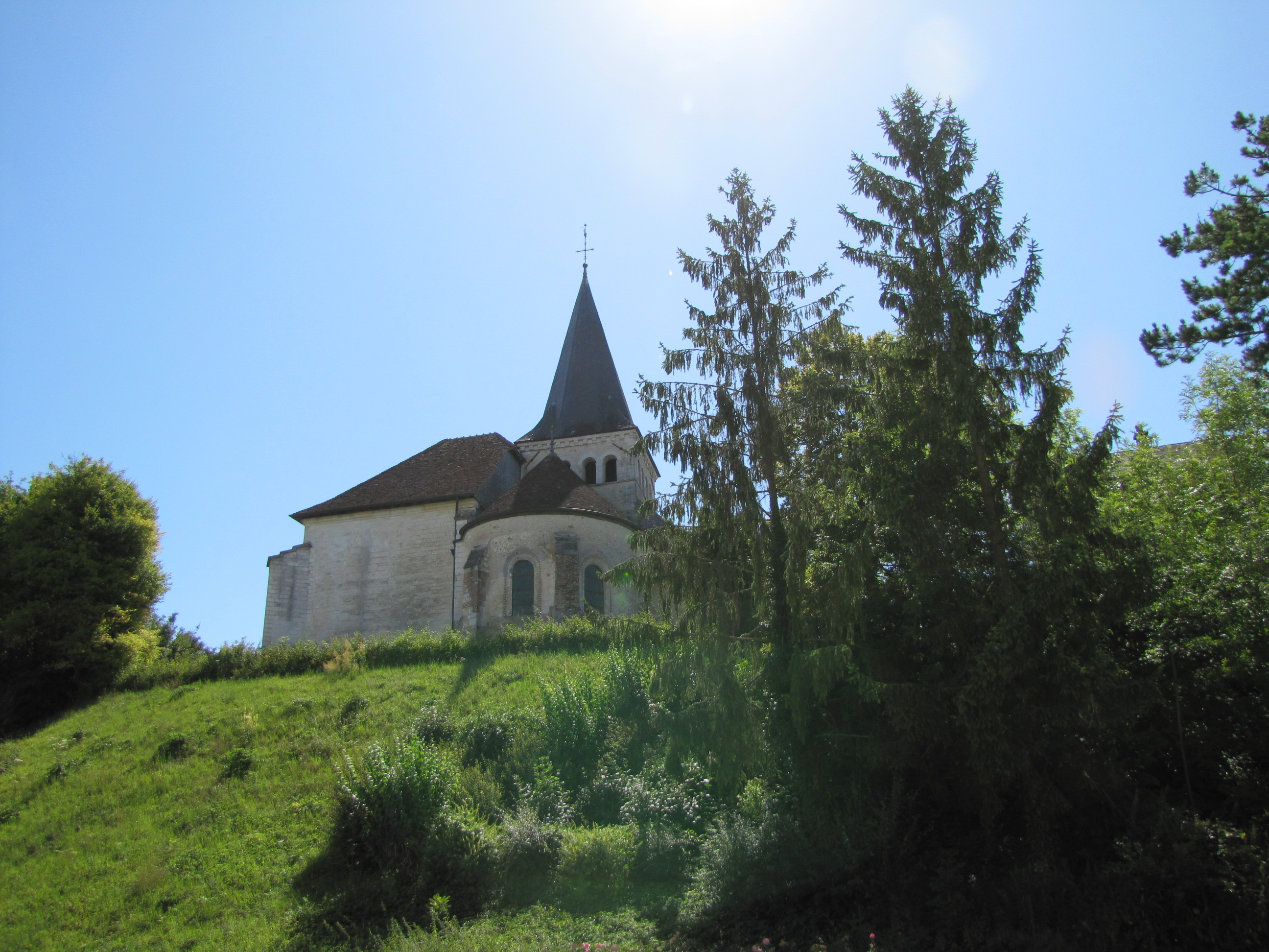 Les deux chevets de l'église d'Isle-Aumont au sommet de la butte.